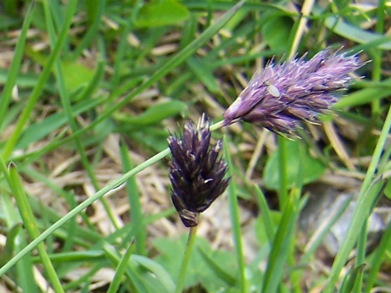 Sesleria tatrae (pl. sesleria tatrzańska), habitat: Tatra Mountains, Ciemniak, Skała Piec